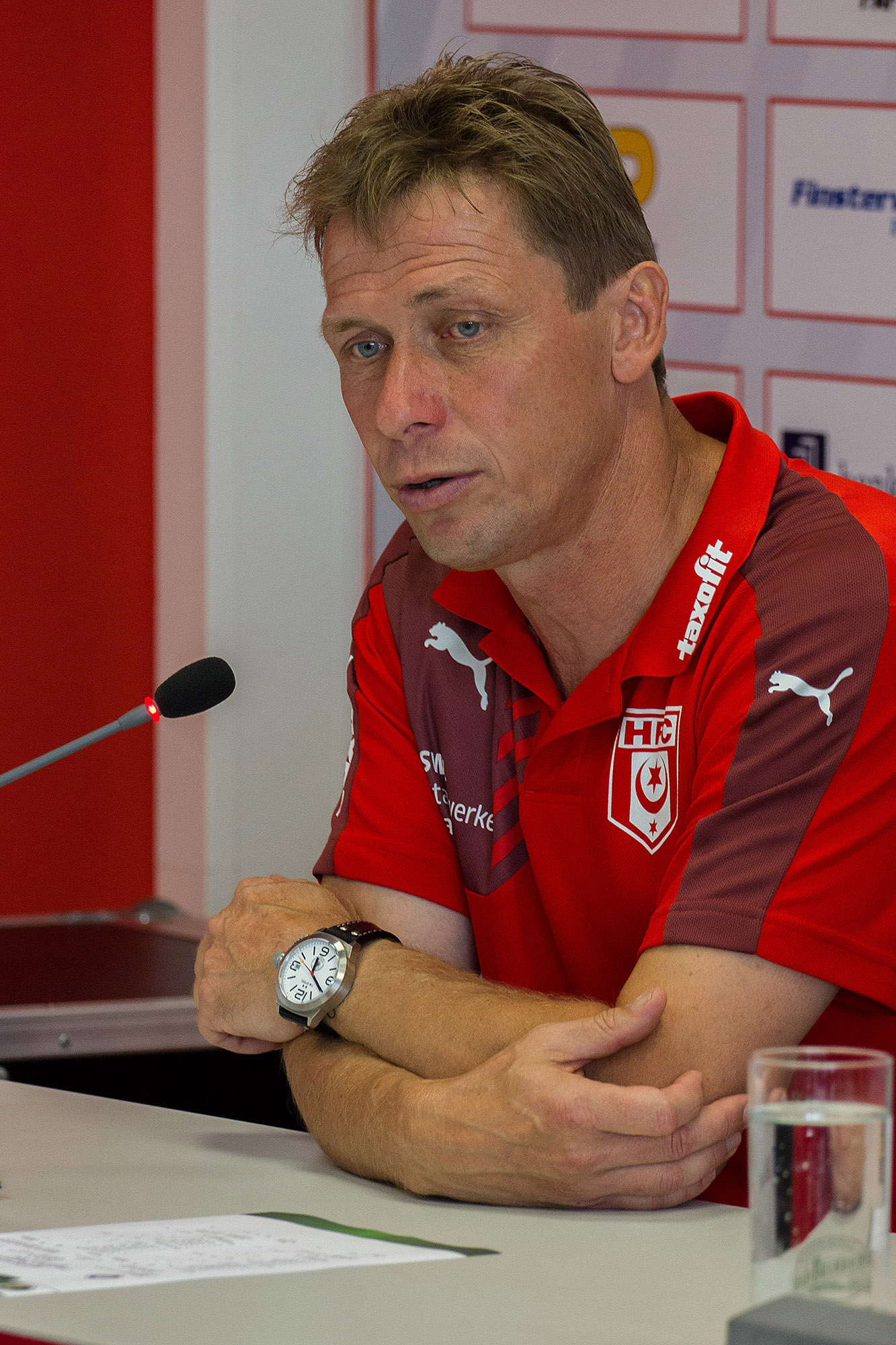 Sven Köhler DFB Pokal 2015/2016 - 1. Runde (Hallescher FC - Eintracht Braunschweig) Pressekonferenz